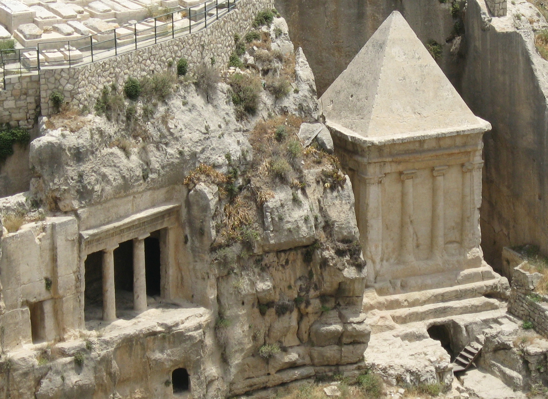 קבר זכריה ובני חזיר בירושלים